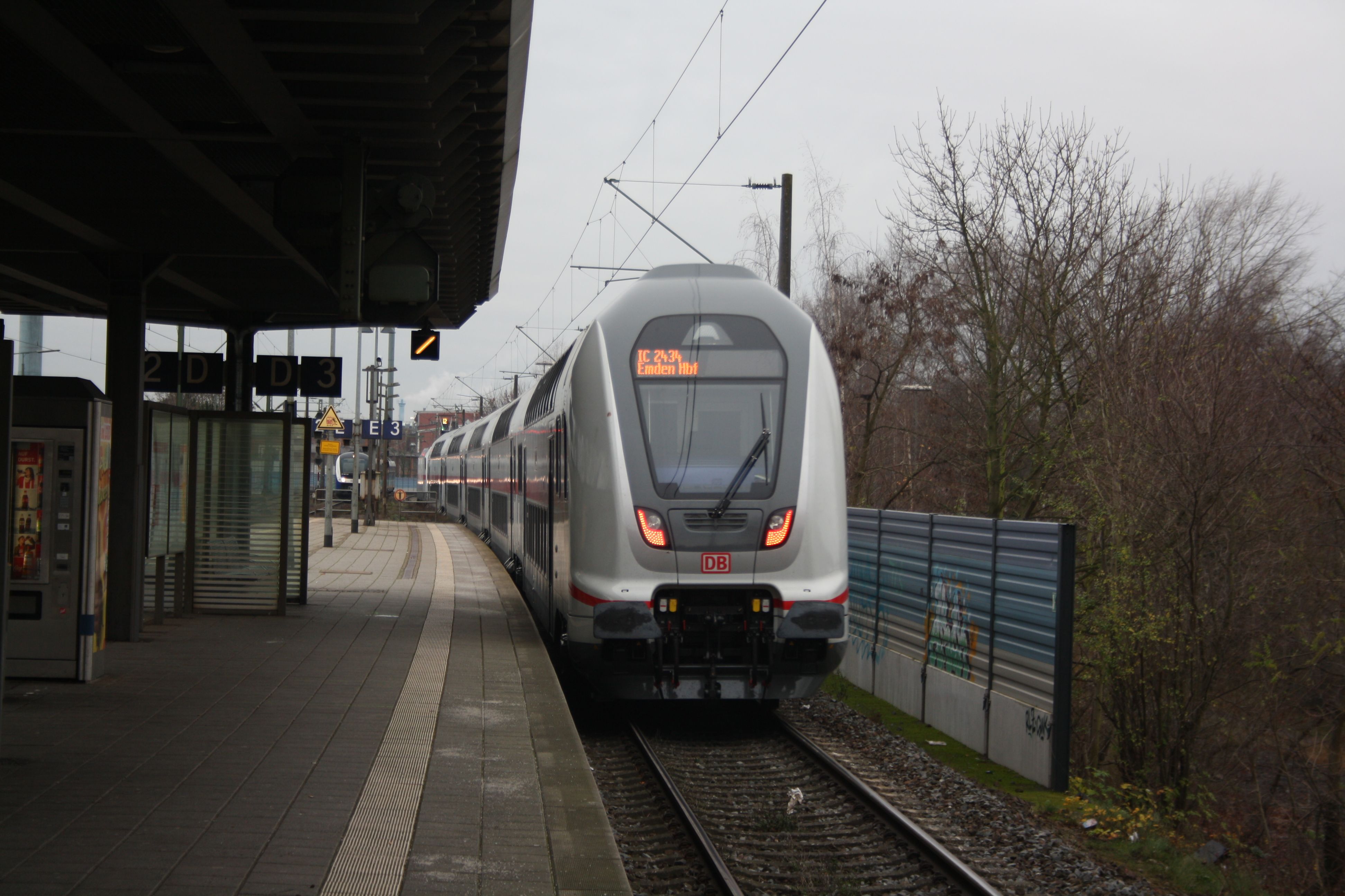 Doppelstock-Intercity (IC2) Richtung Emden am 2. Tag des planmäßigen Einsatzes bei Ausfahrt aus Bahnhof Delmenhorst